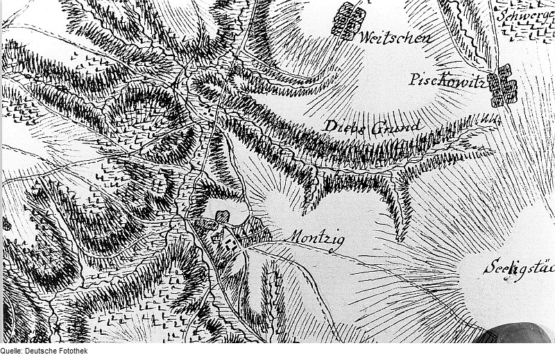 Original image description from the Deutsche Fotothek Triebischtal-Munzig. Ausschnitt aus: Karte von einem Teil des Kurfürstentums Sachsen, Petri, nach 1759 (Sign.: VII 63)